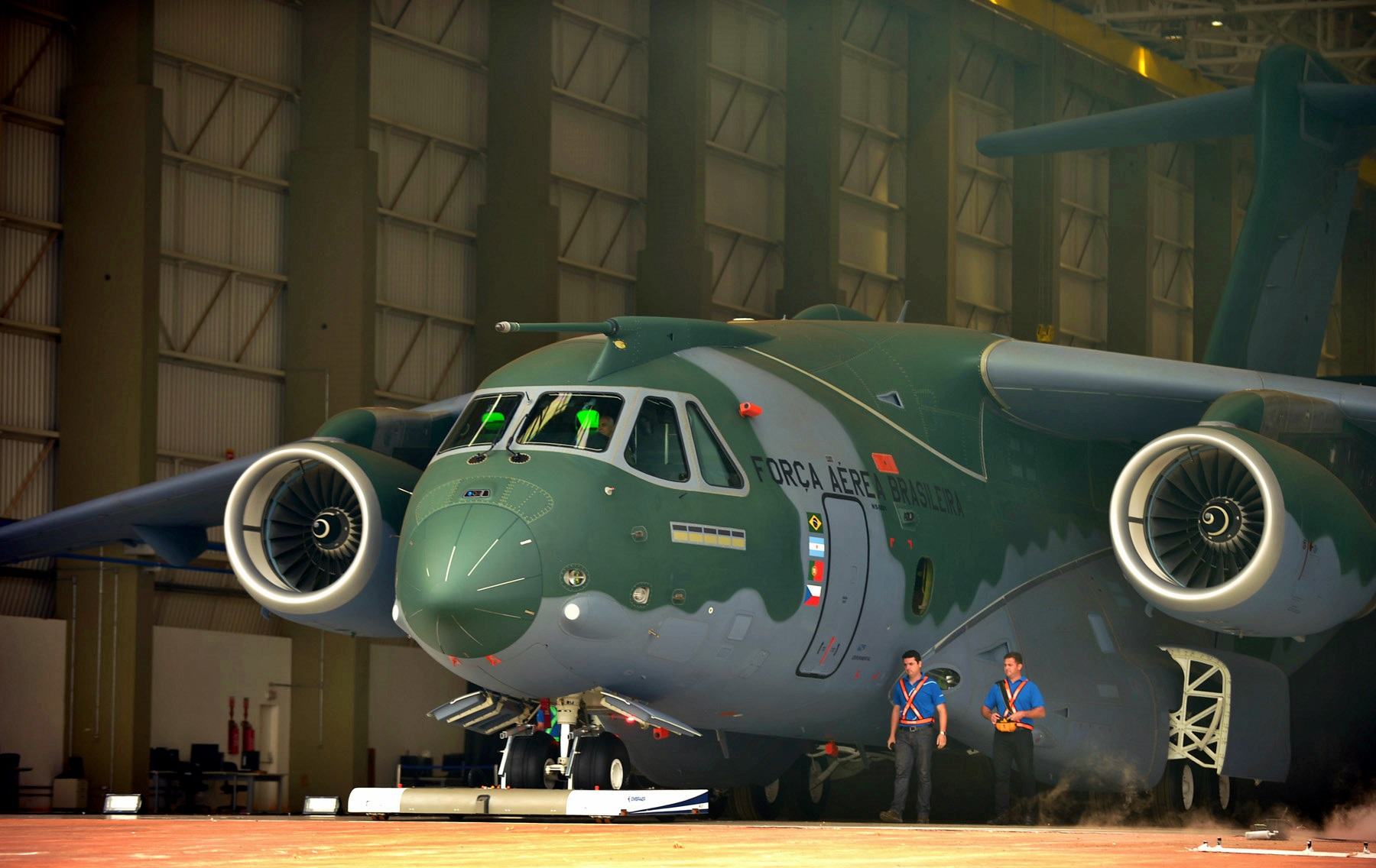 21/10/2014, Gavião Peixoto - SP Fotos: Tereza Sobreira